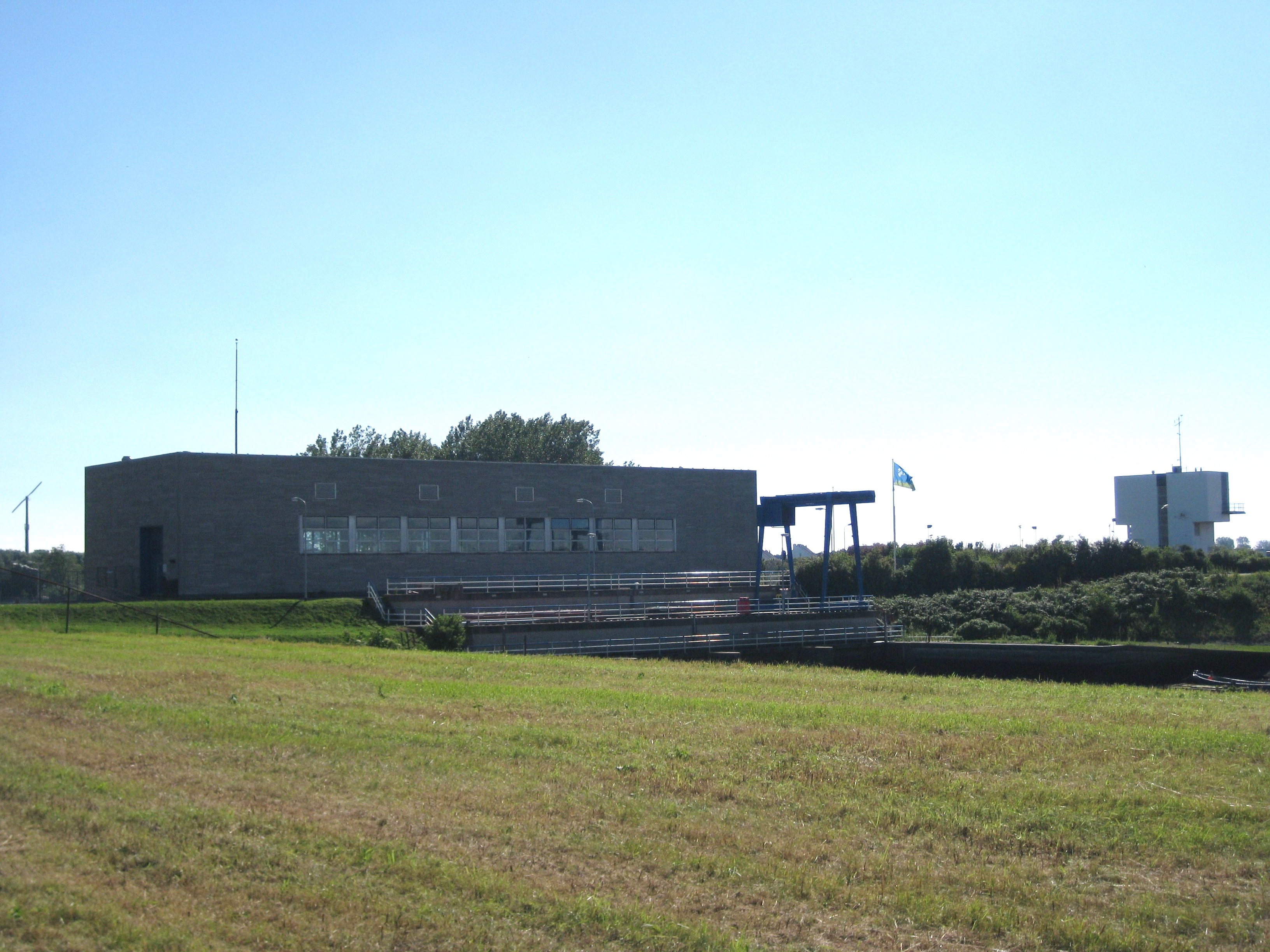 Gemaal de Helsdeur in Den Helder 13 april 1973 in gebruik genomen. Architect H.Postel